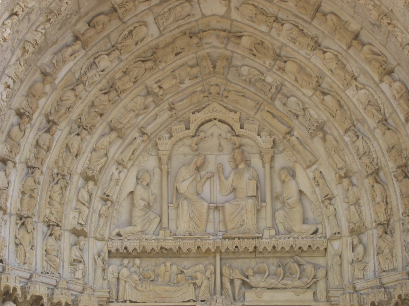 Tympan du couronnement de la Vierge, Porche Nord, portail central de la cathédrale de Chartres